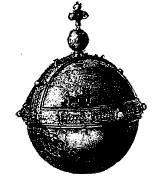 Riksäpplet